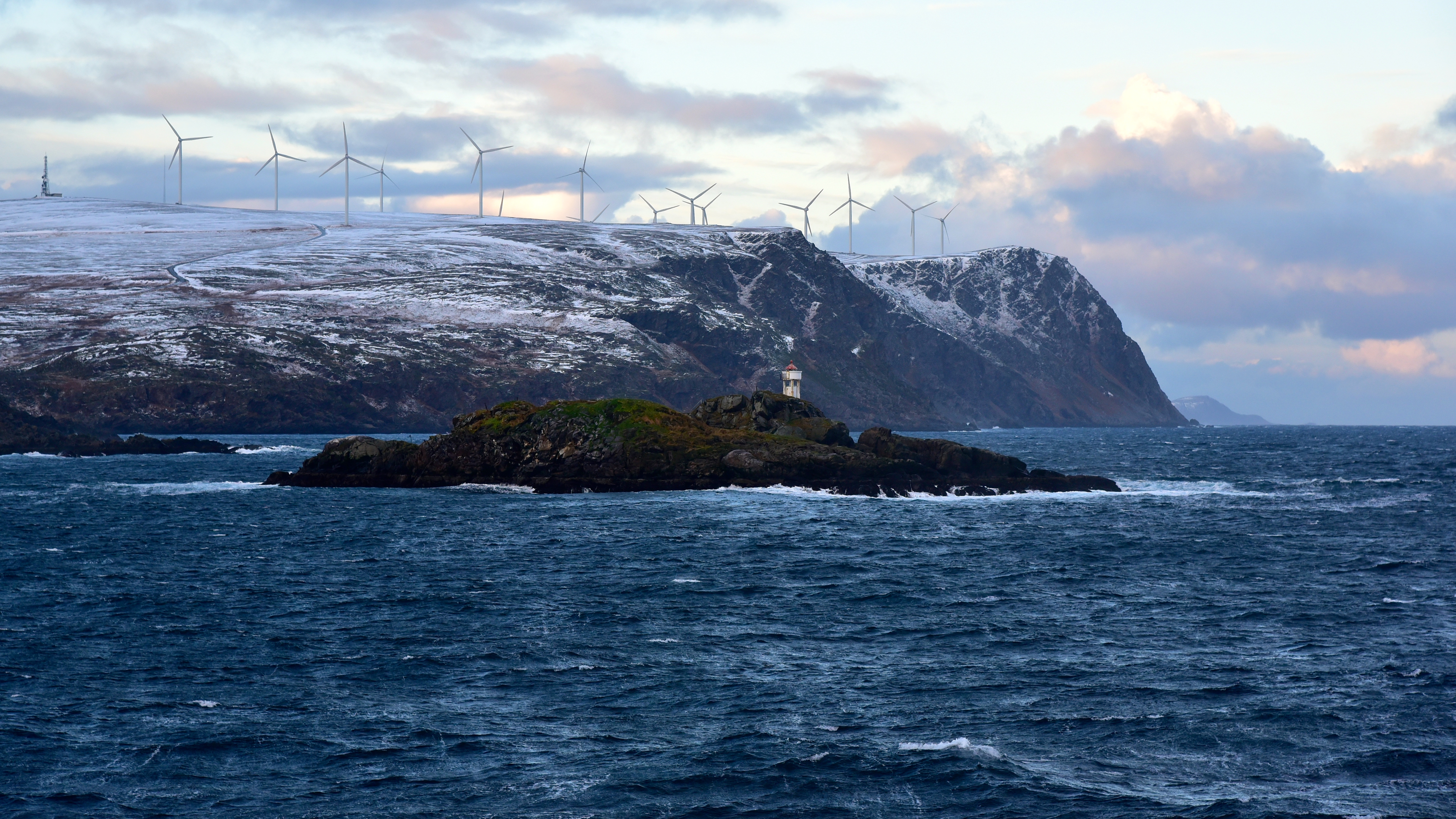 Hurtigruten Ferry / Cruise